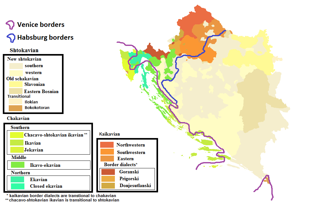 Karta dijalekata; I granica iz 1606; Govornici štokavskih dijalekata pred osmanskim osvajanjima migriraju na povijesni prostor čakavskih i kajkavskih dijalekata.